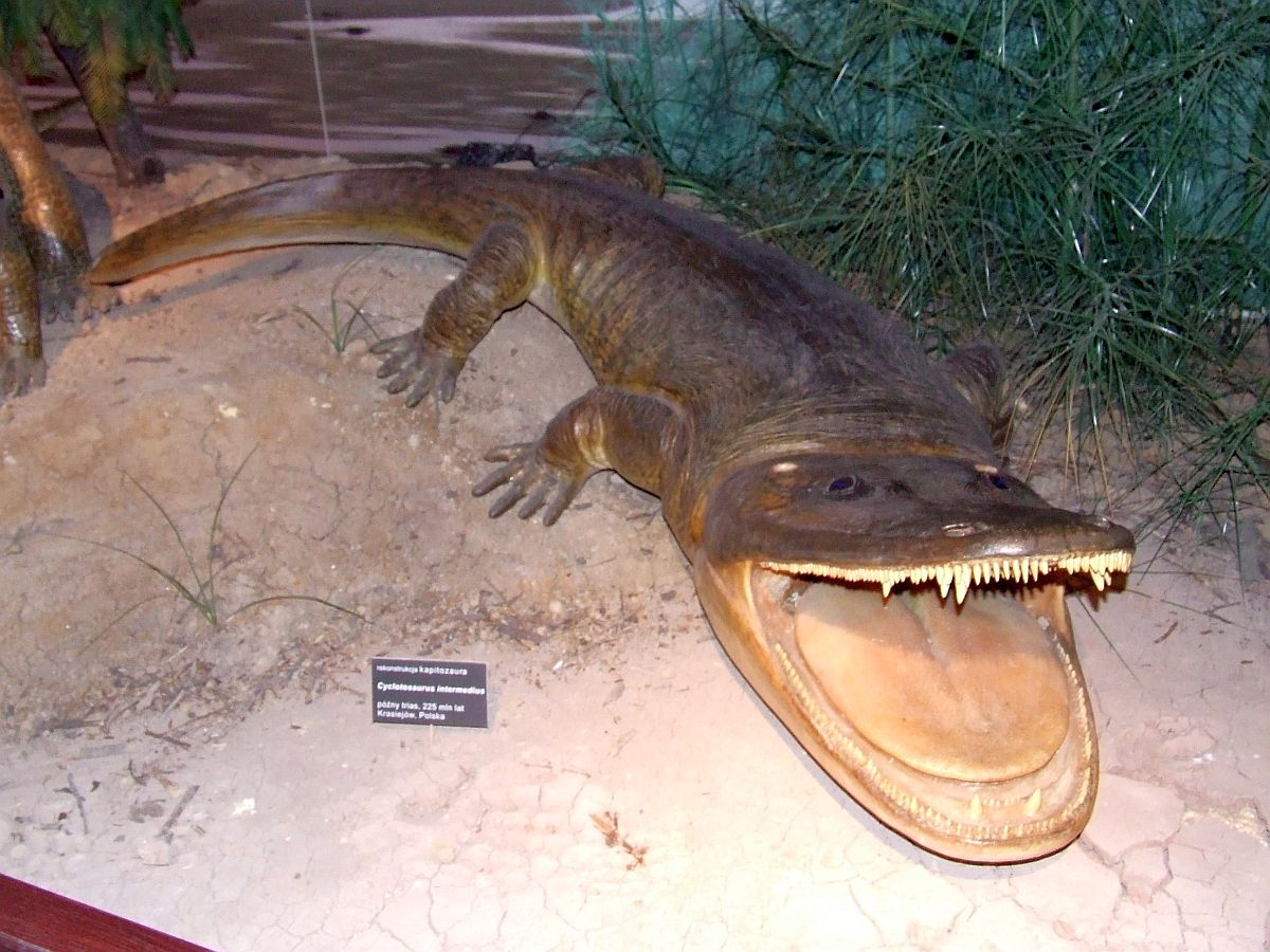 Rekonstrukcja kapitozaura z gatunku Cyclotosaurus intermedius sfotografowany w Muzeum Ewolucji PAN